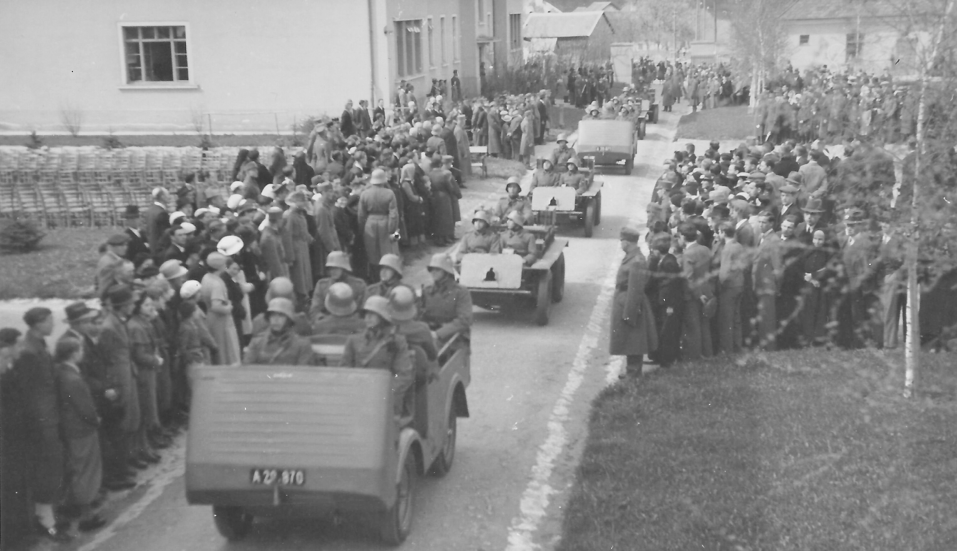 Feldjägerbataillon 2 bei einer Parade in der Kaserne Pinkafeld. Die Aufnahme entstand entweder 1936 oder 1937. Genauere Details werden von lokalen Historikern momentan abgeklärt.